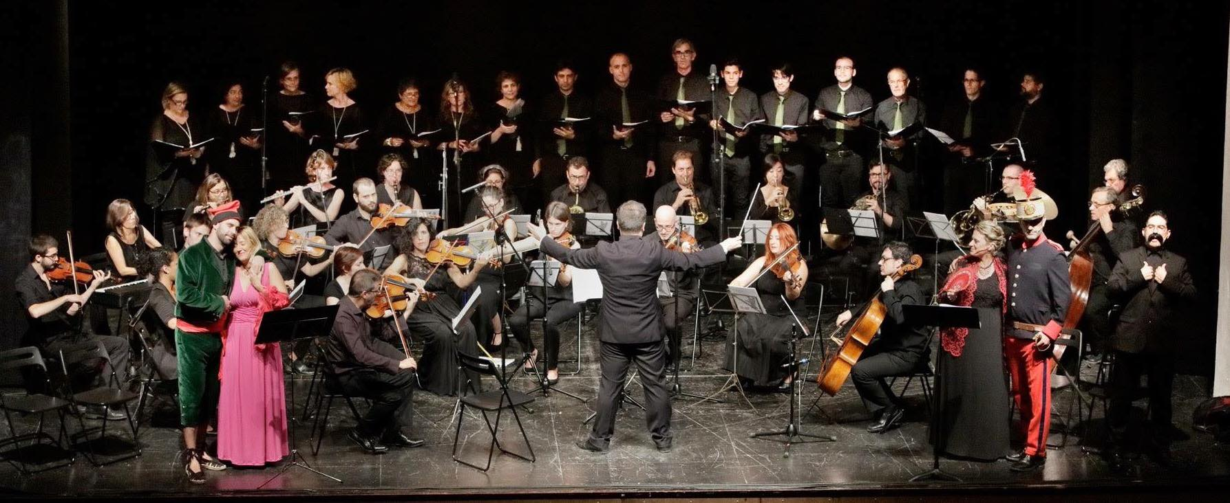 Rondó final de la Sarsuela. Amb els 4 solistes i l'actor. Orquestra Simfònica i Cor.